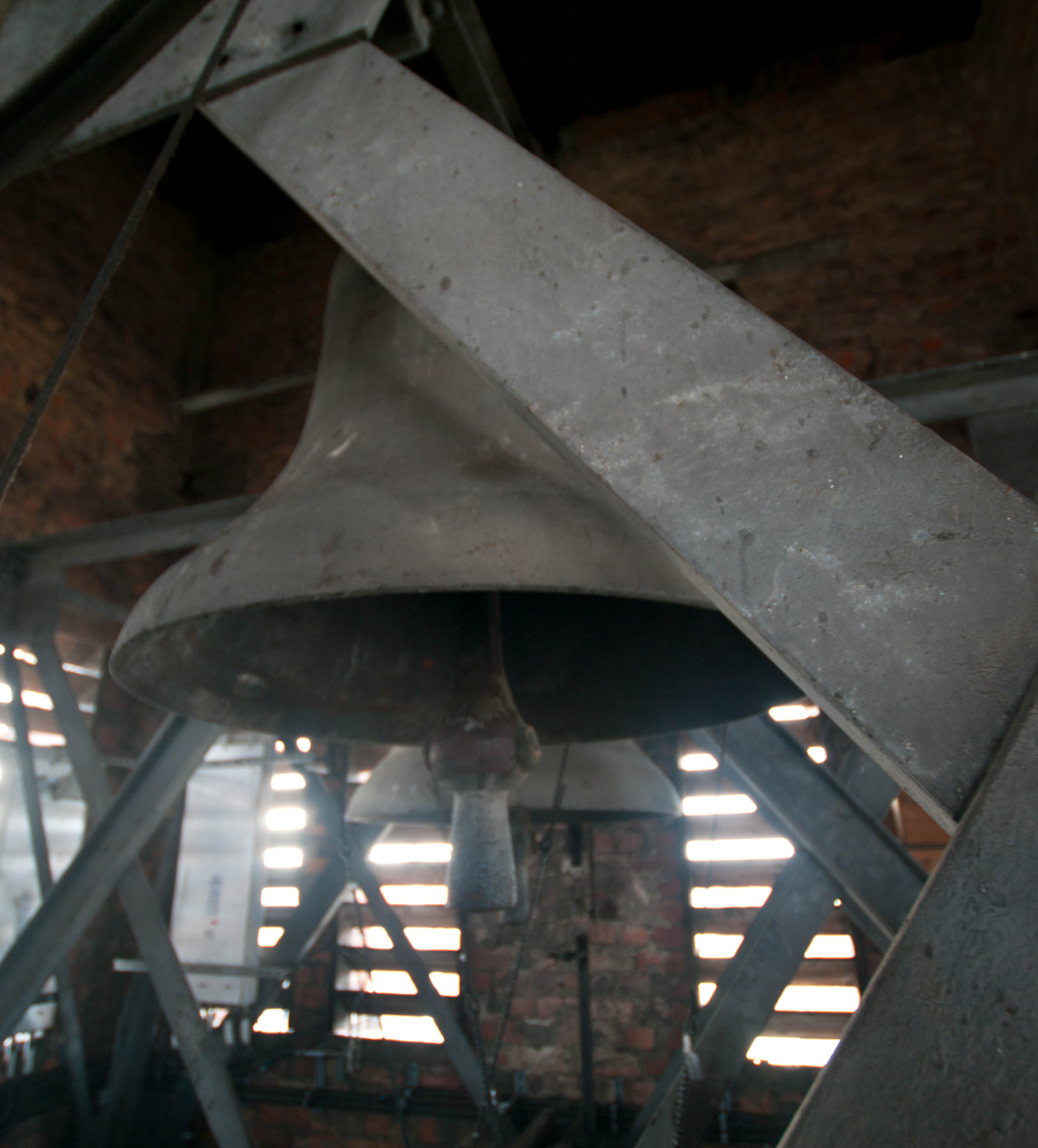 Kirchenglocken der Kapernaumkirche, Berlin-Wedding